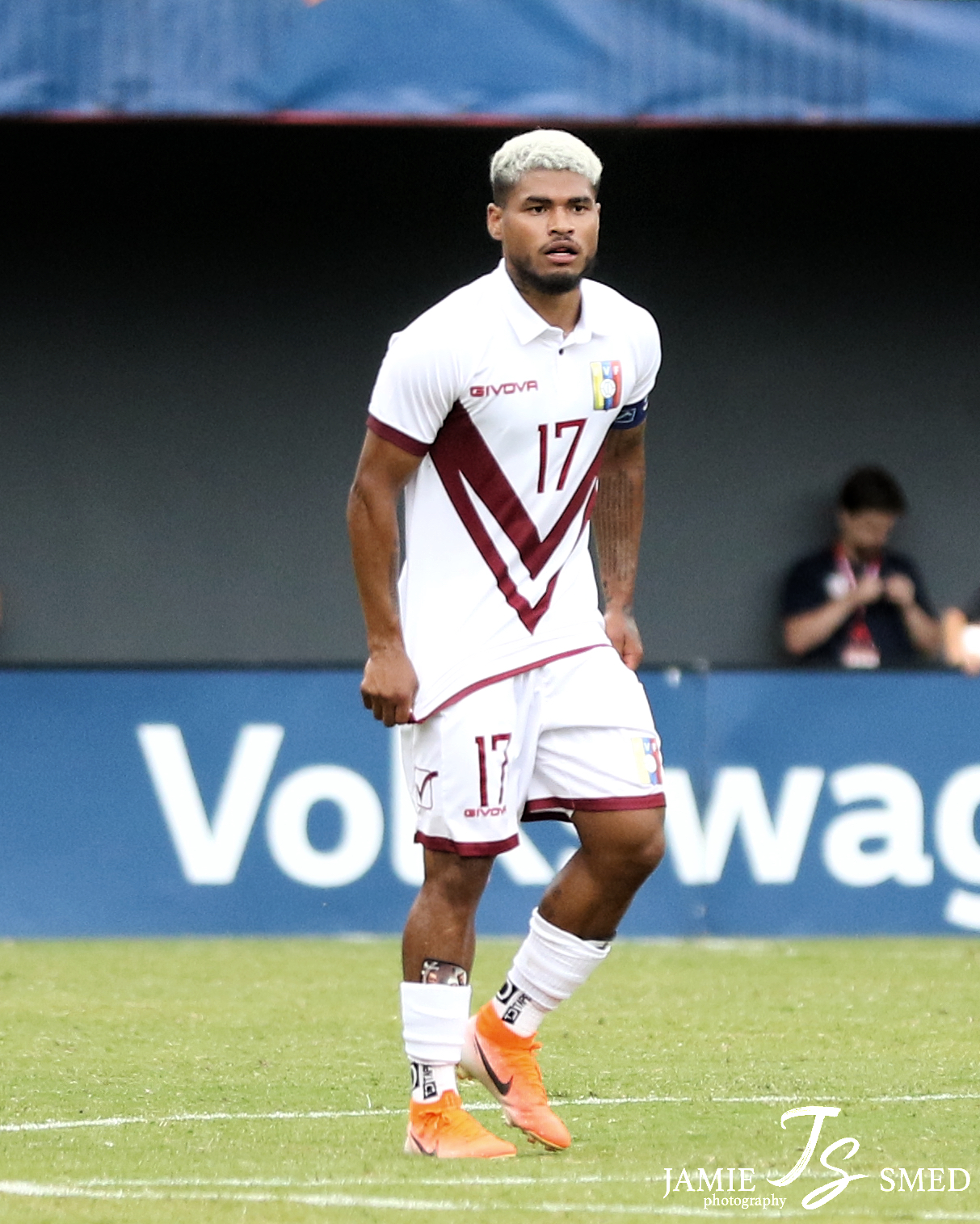 Josef Martínez